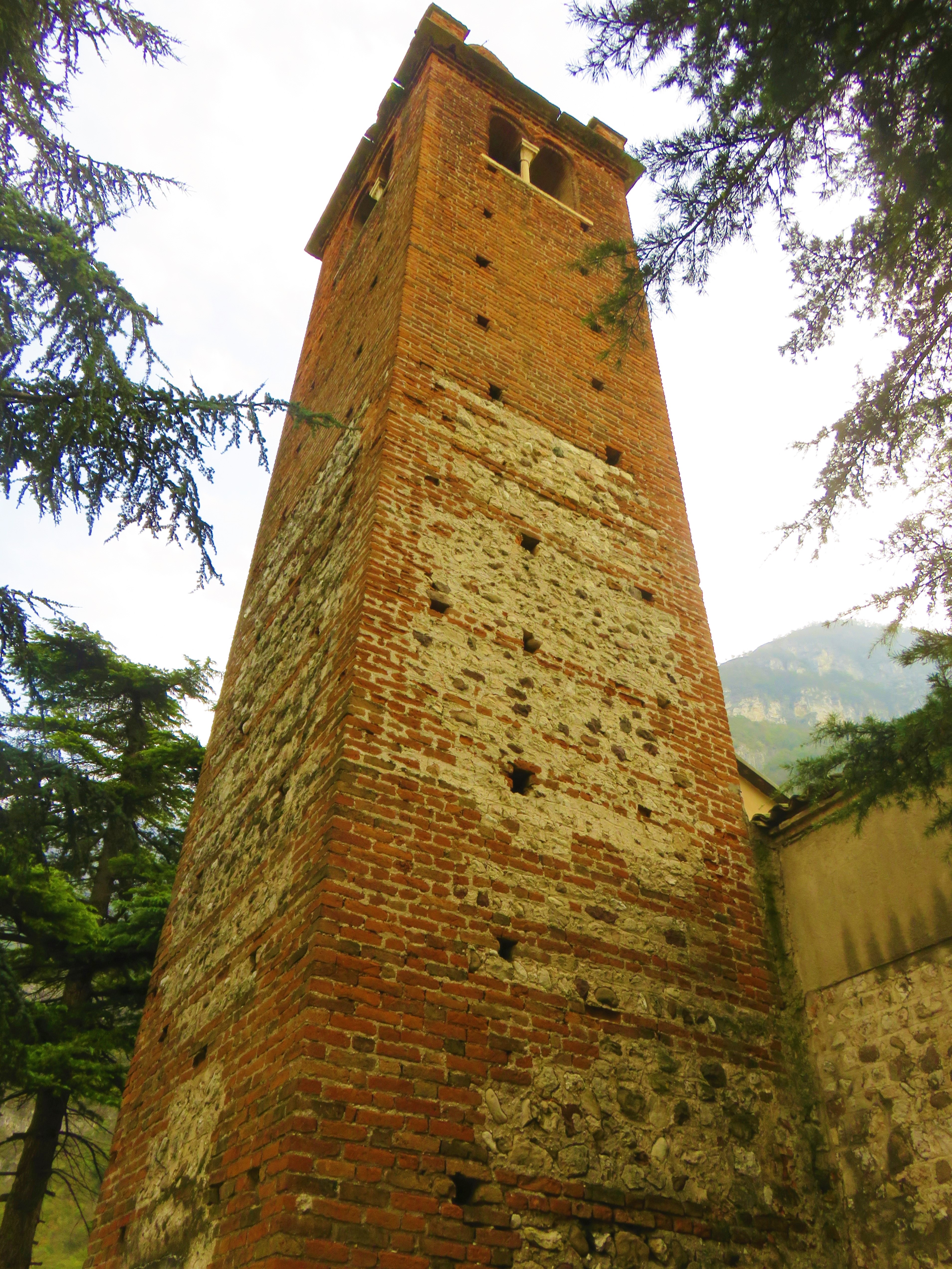 Chiesa di San Pietro in Bosco. Campanile.